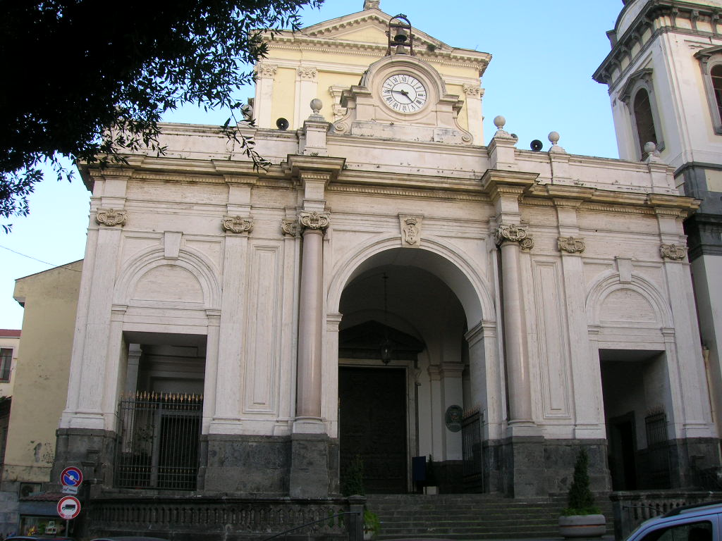 Facciata esterna della chiesa di Maria Santissima Assunta di Castellammare di Stabia